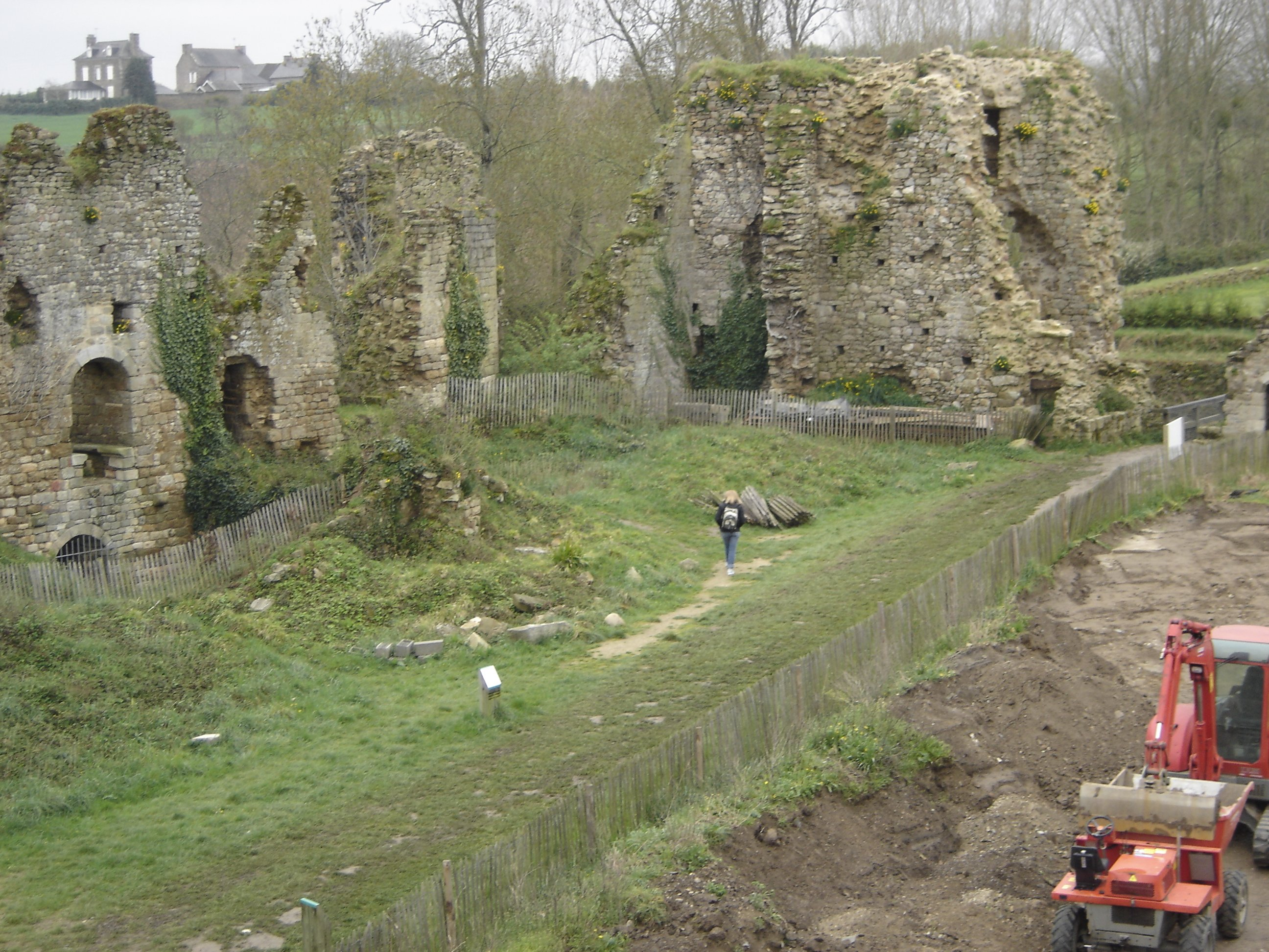 photo du château du Guildo où château de Gilles de Bretagne prise un jour de promenade ... elle est vraiment pas géniale mais je n'en ai pas d'autre bref à remplacer par plus jolie ou et globale du site